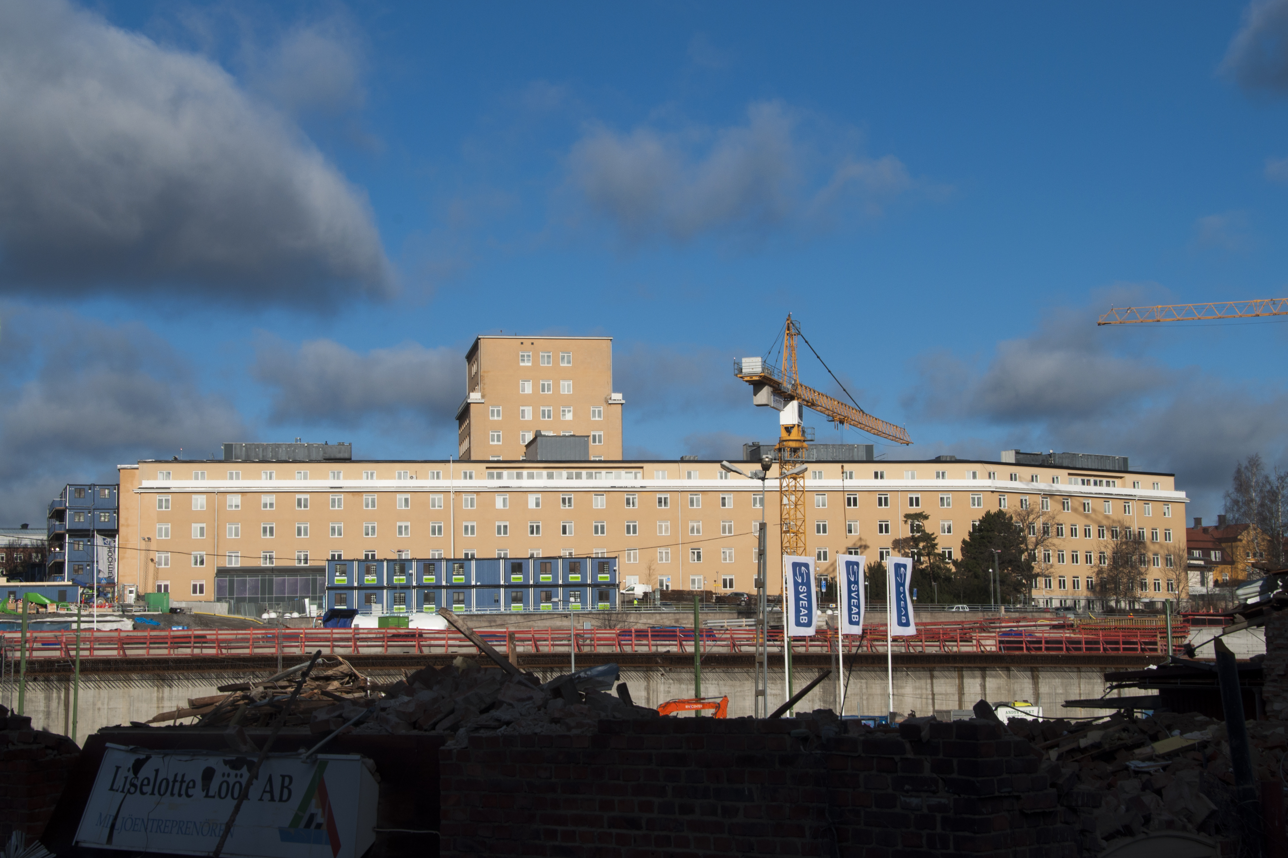 Norrbackainstitutet. Byggnadsår 1935, arkitekt John Åkerlund.